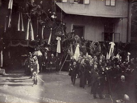 Ecsedi Kovács Gyula színész, rendező temetése 1899-ben